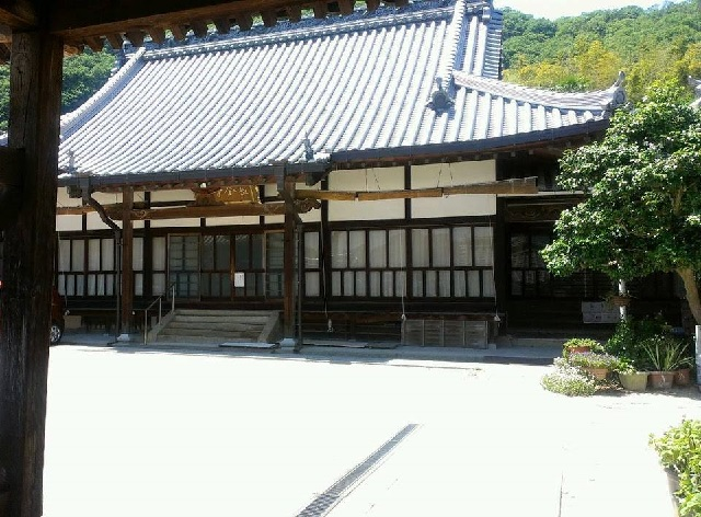 建物は長全寺の主な建築であり1866年に完成した。山門は1751年から1764年の間に立てられた。